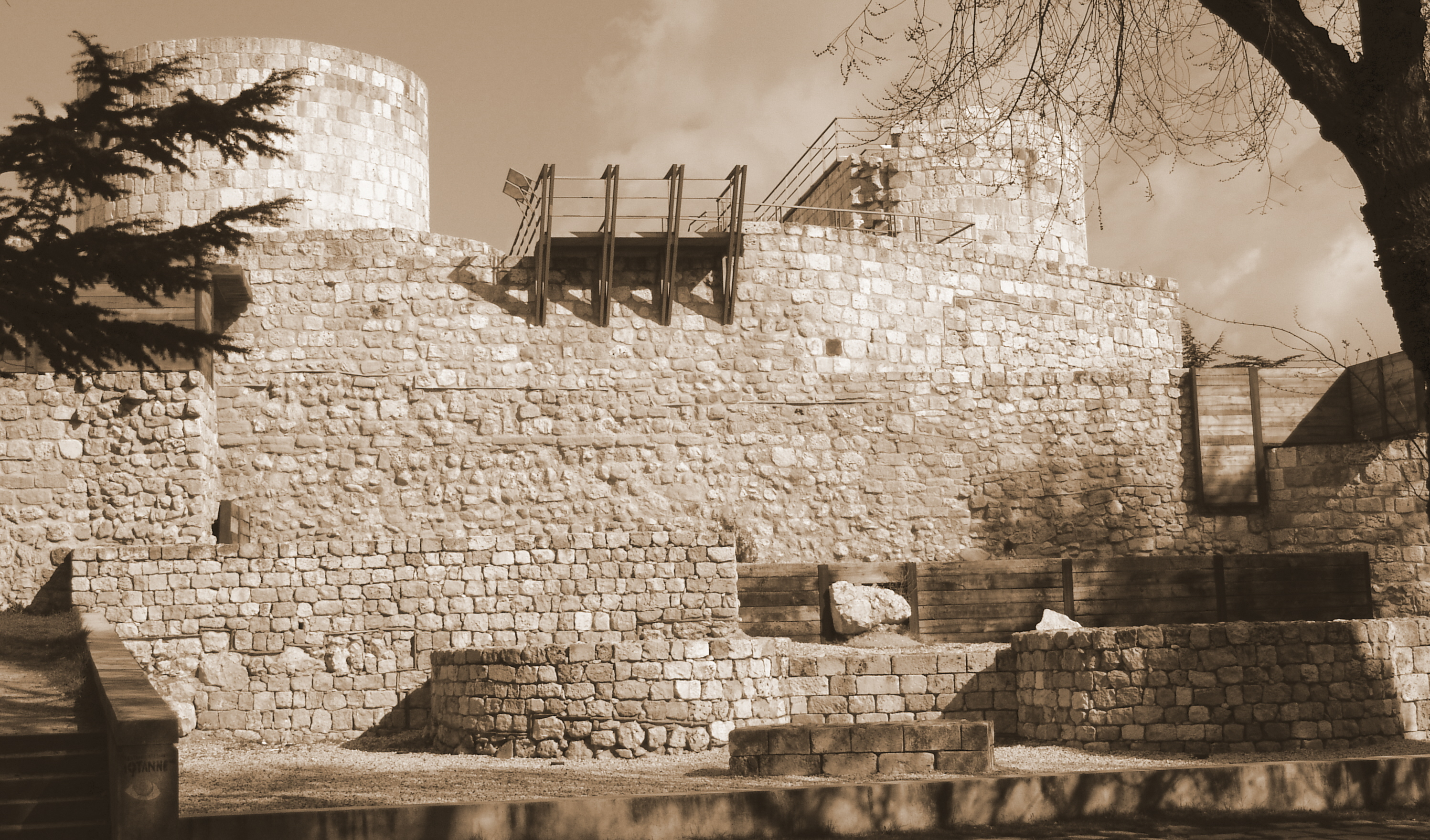 Castillo, Burgos, España